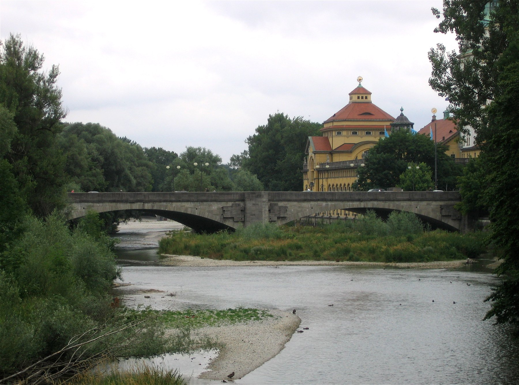 Ludwigsbrücke Ostseite, München, im Hintergrund das Müllersche Volksbad